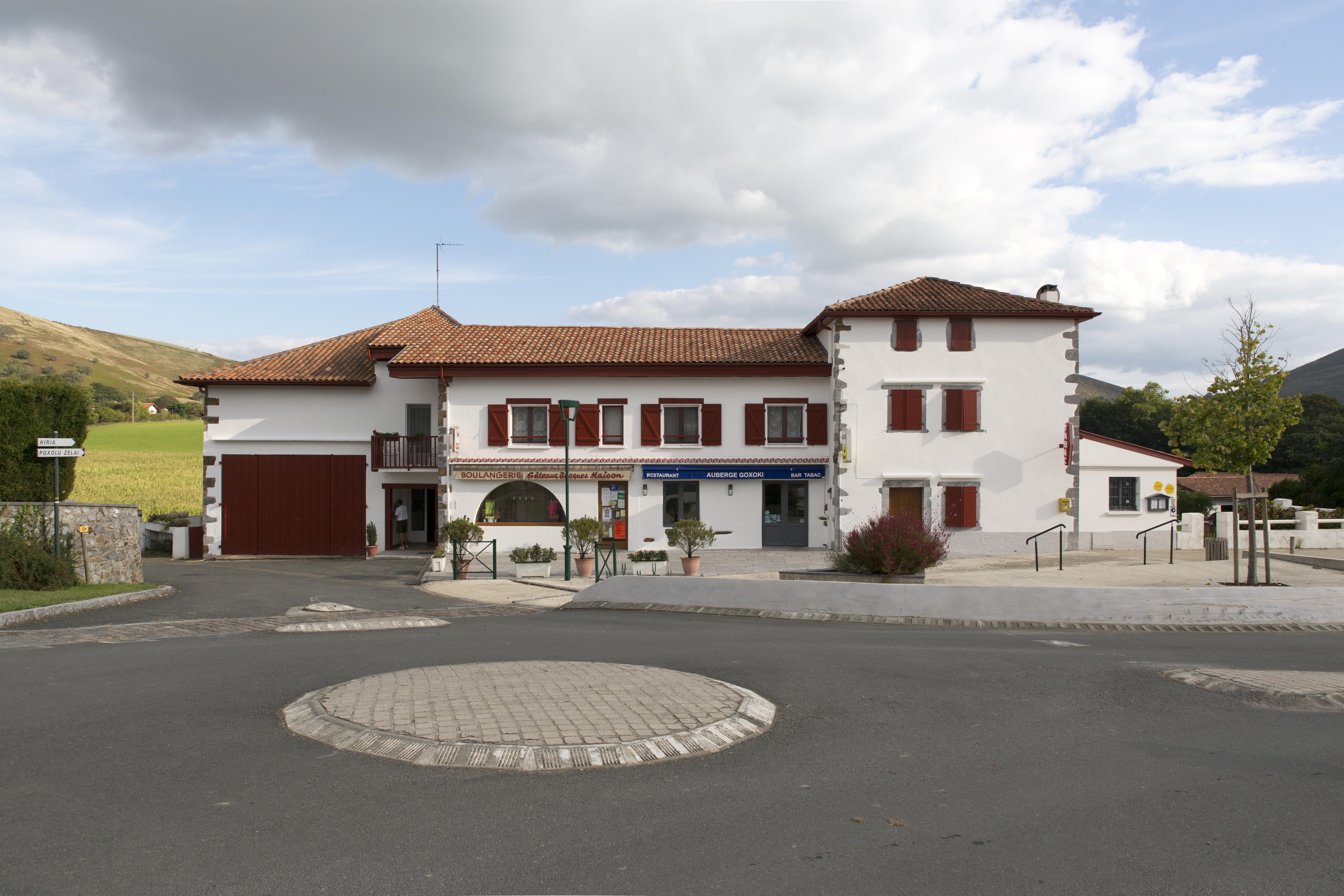 commerce